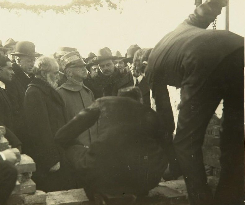 Paolo Orlando con il re Vittorio Emanuele III alla cerimonia della posa della pietra di cantone della Stazione di Ostia Nuova, 10 dicembre 1921 (Archivio Storico Capitolino, Archivio dello Studio di Paolo Orlando – Carteggio, b. 3, fasc. 14).